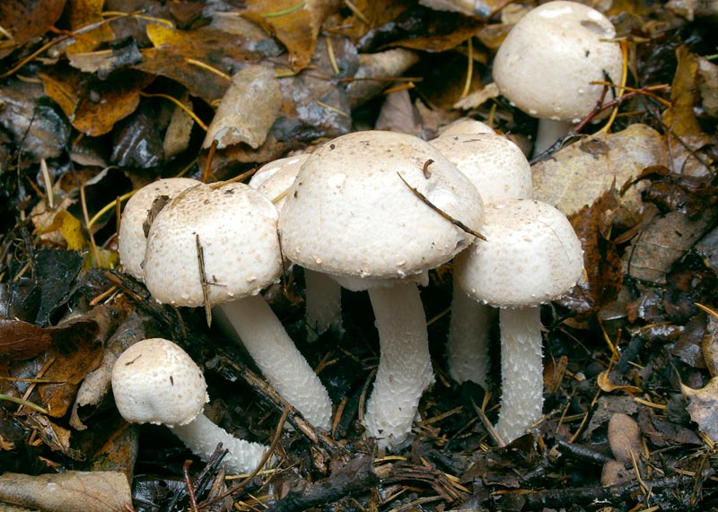 Agaricus silvaticus